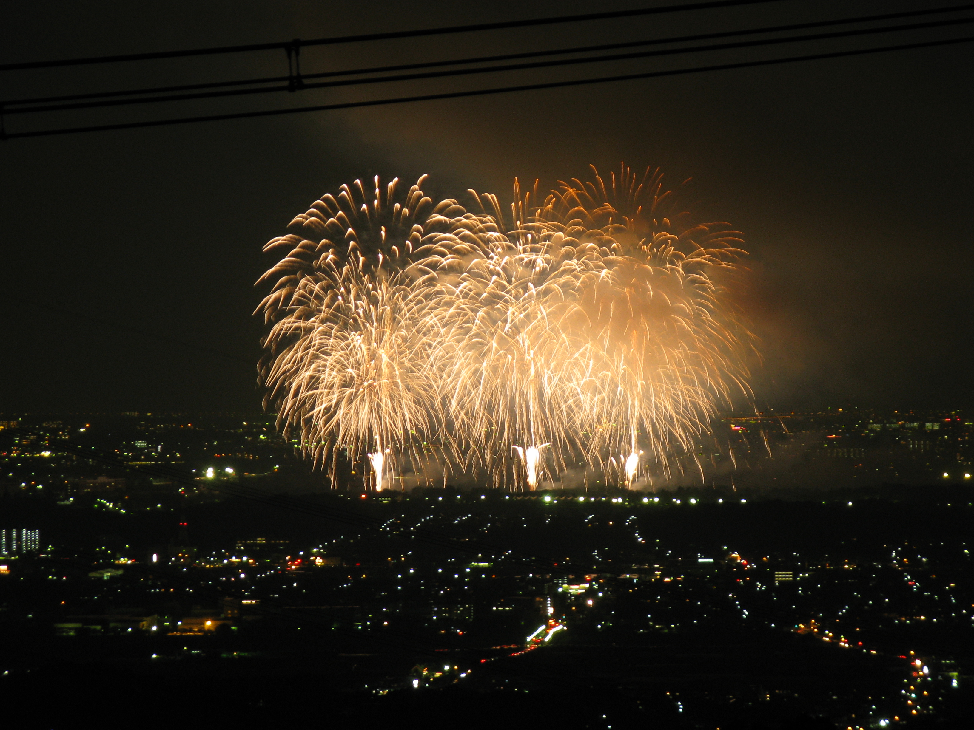 教祖祭PL花火芸術(二上山・鹿谷寺近くの展望台より撮影)